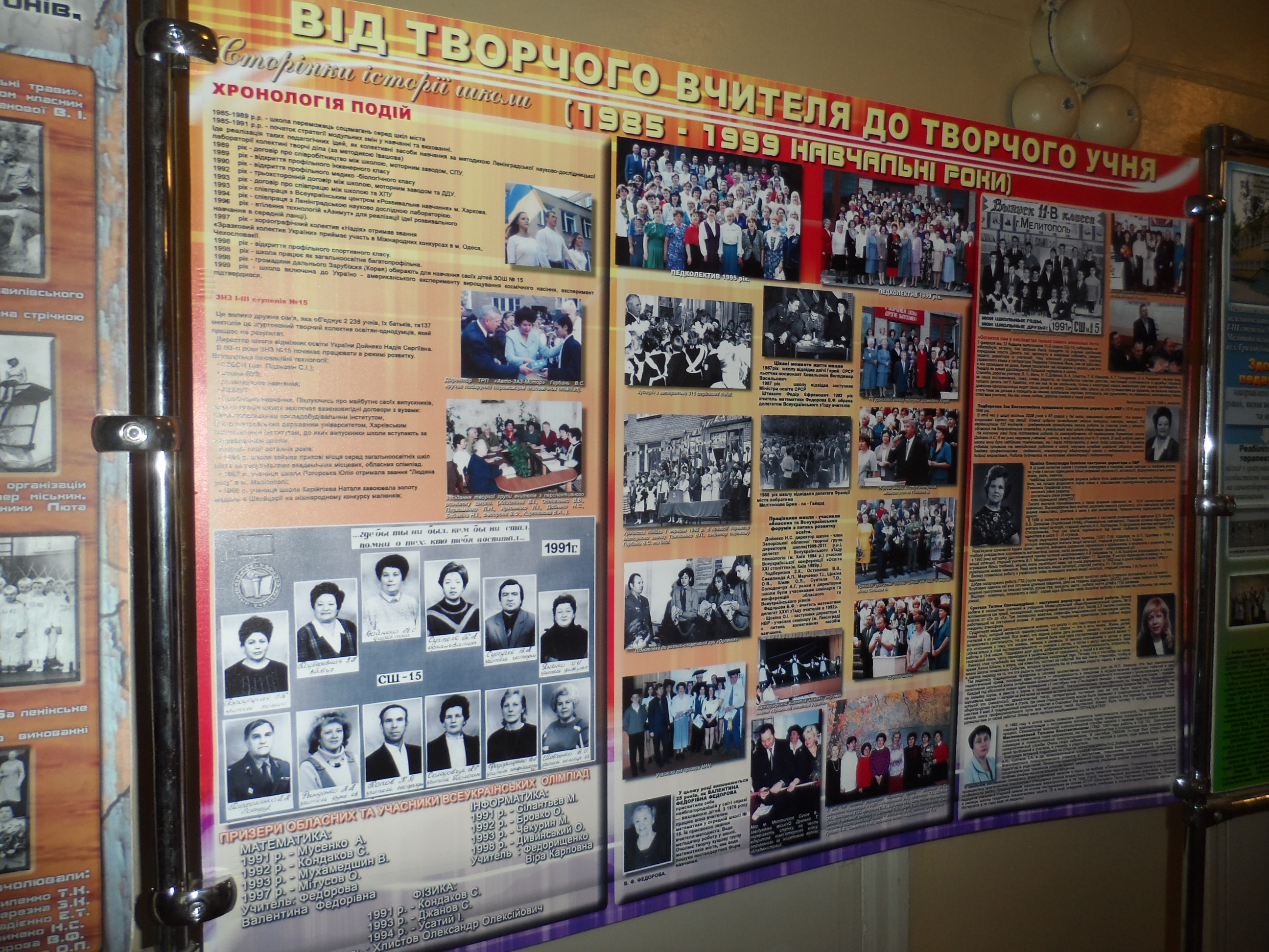 История